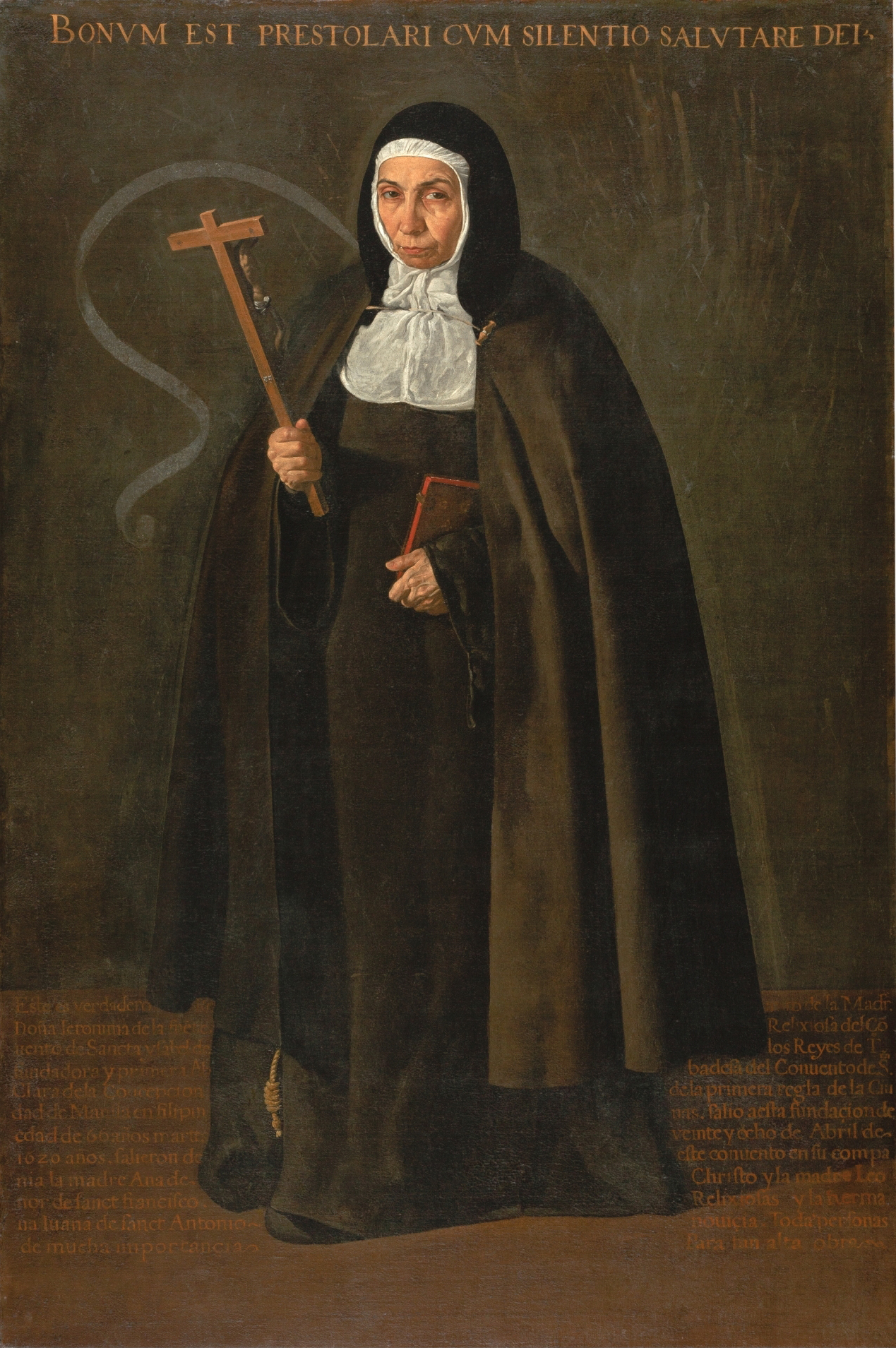 Retrato de la venerable religiosa franciscana Jerónima de la Fuente (1555-1630).